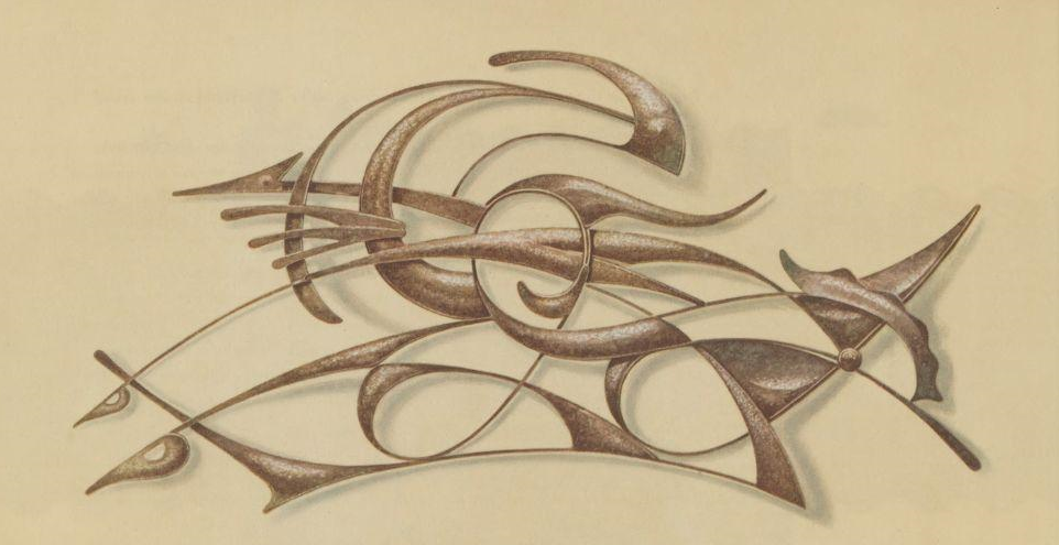 Siem van den Hoonaard bronsfiguur De Snelheid van den Wind (vestibule touristenklasse promenade-dek 'Nieuw Amsterdam', 1938)